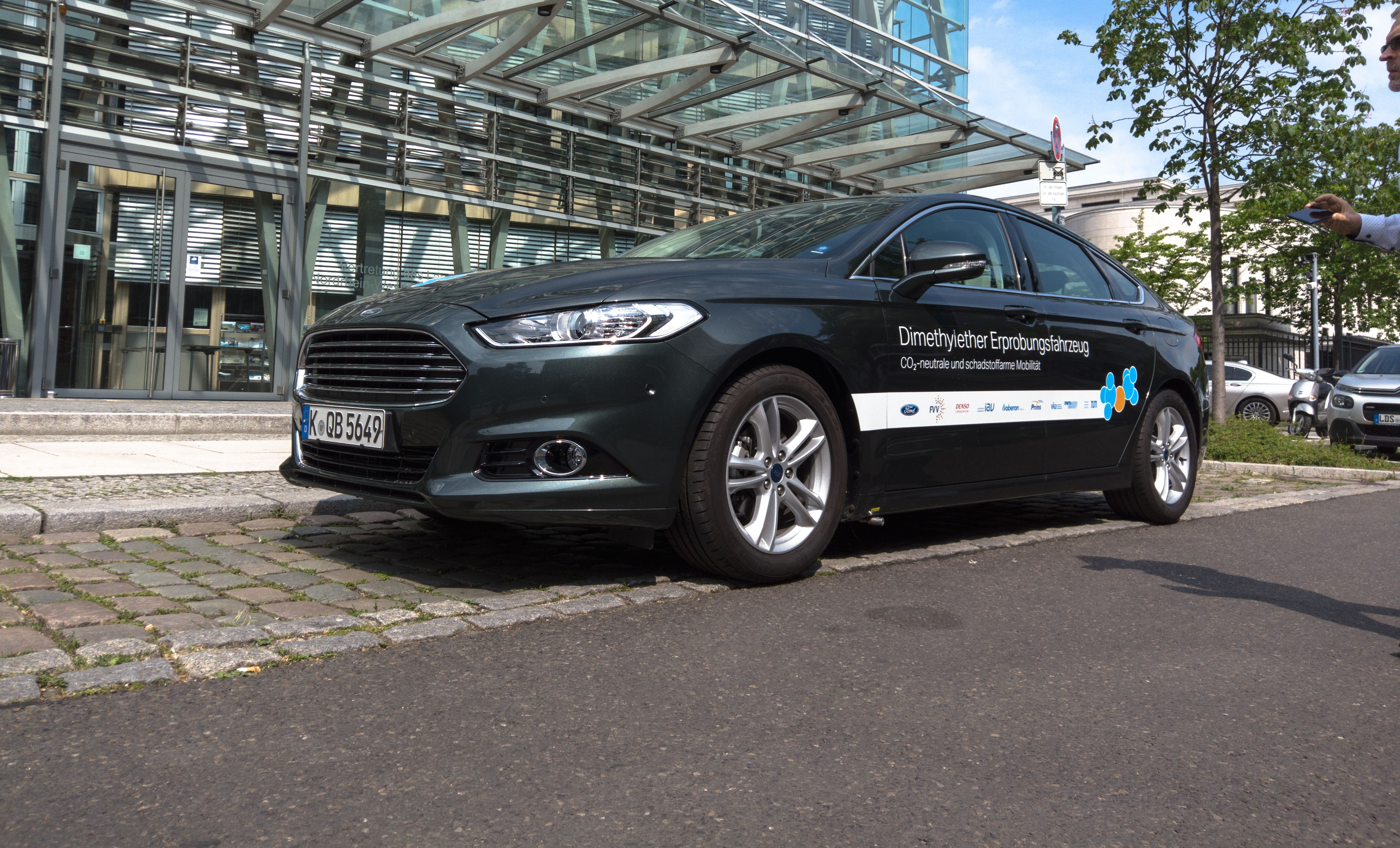 автомобиль использует ДМЭ в виде единственного и безальтернативного топлива